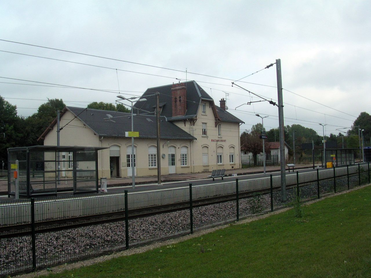 Gare détruite durant la 1ere guerre mondiale, reconstruite selon le style typique utilisé par le réseau Est.